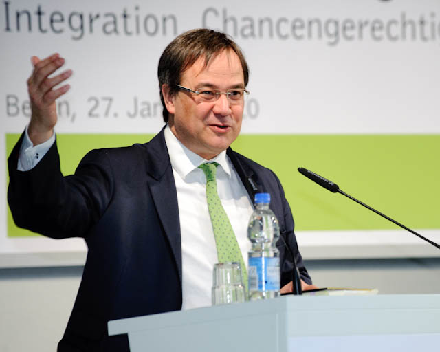 Podiumsdiskussion in der Heinrich-Böll-Stiftung: Vom Einwanderungsland zur Aufsteigerrepublik? Integration, Chancengerechtigkeit und Teilhabe in Deutschland Foto: Stephan Röhl